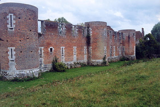 Vue de la courtine occidentale du château du Hallier, commune de Nibelle, Loiret, France